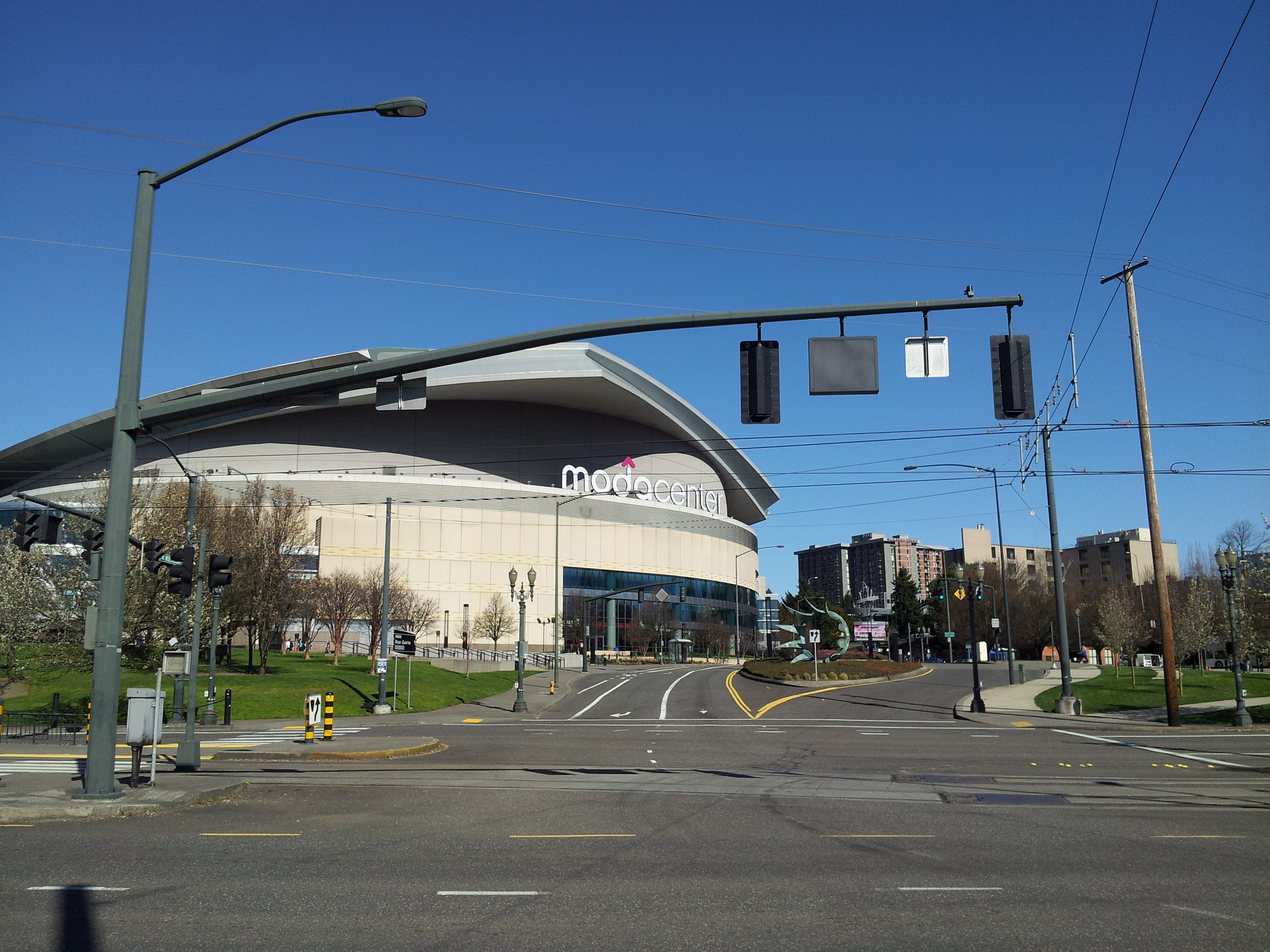 Moda Center (2015)